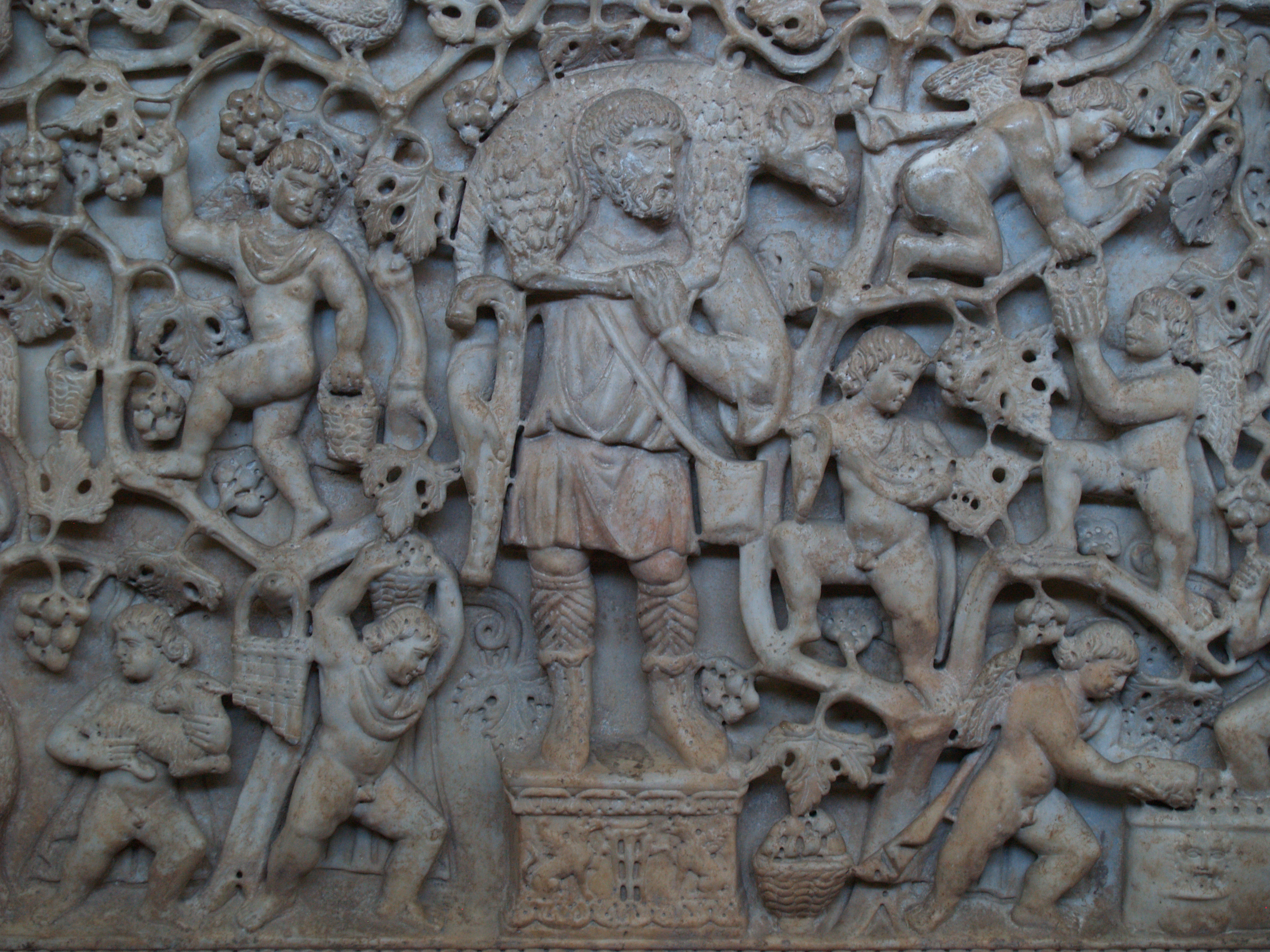 Vaticano. Museo Pio-Cristiano sarcófago paleocristiano.